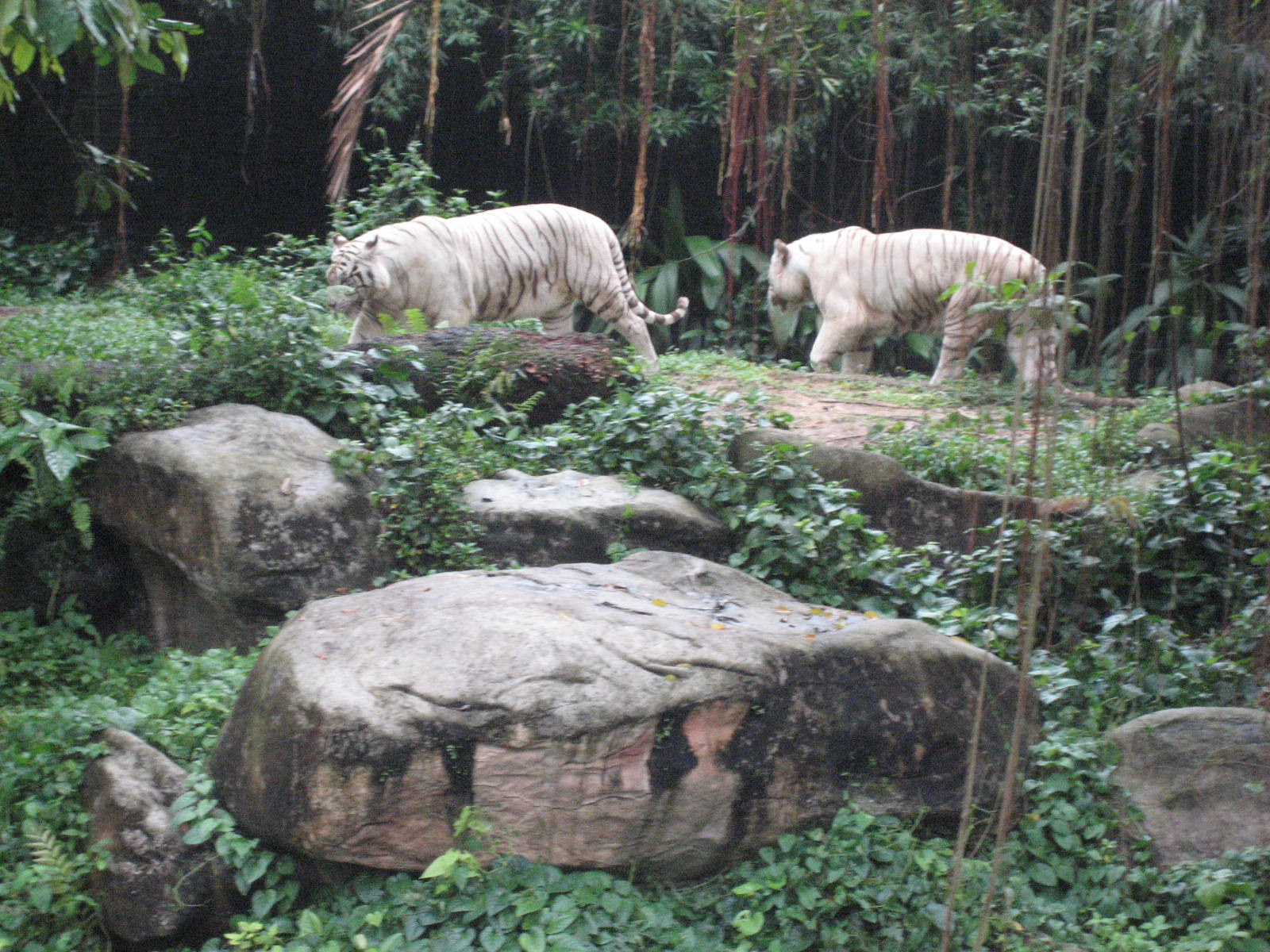 White tigers at Singapore zoo